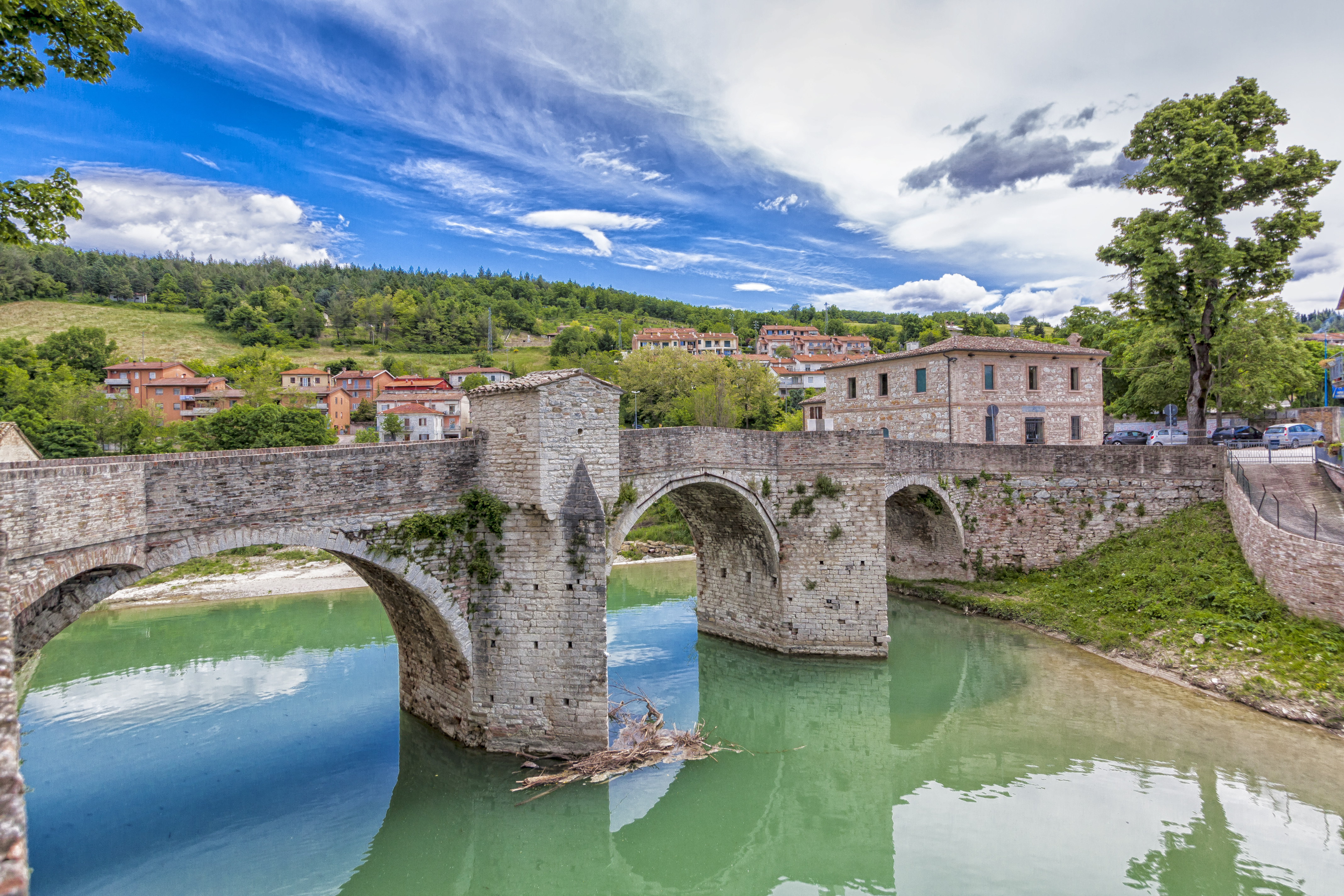 Arcate del Ponte Romano di Fermignano This is a photo of a monument which is part of cultural heritage of Italy.